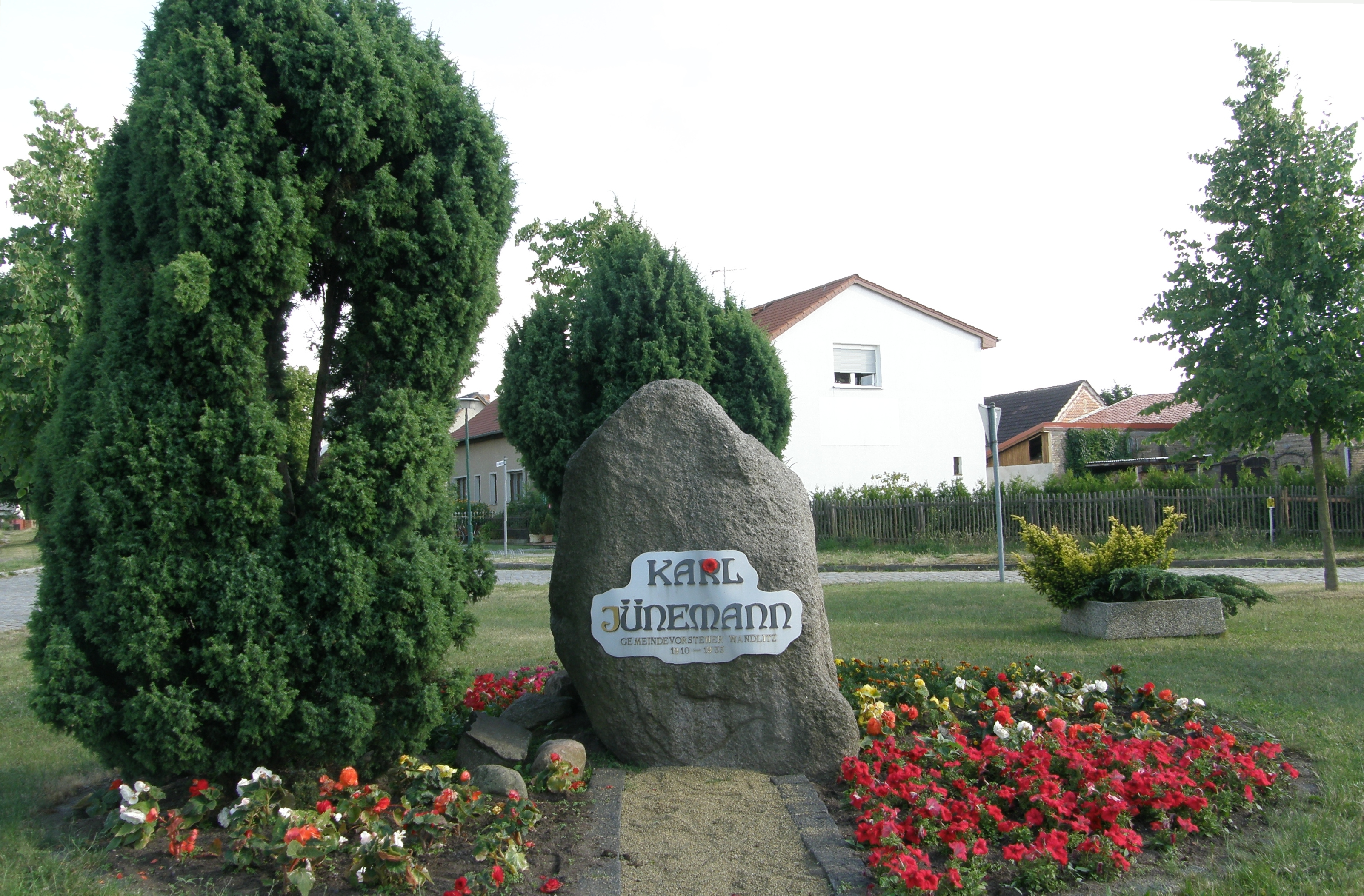 Gedenkstein für den Gemeindevorsteher Karl Jünemann auf dem gleichnamigen Platz im Dorf Wandlitz